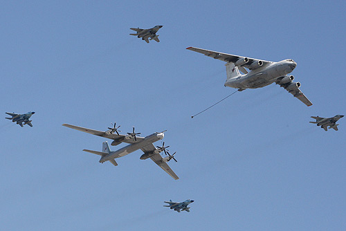 МОСКВА. Военный парад в честь 64-й годовщины Победы в Великой Отечественной войне.